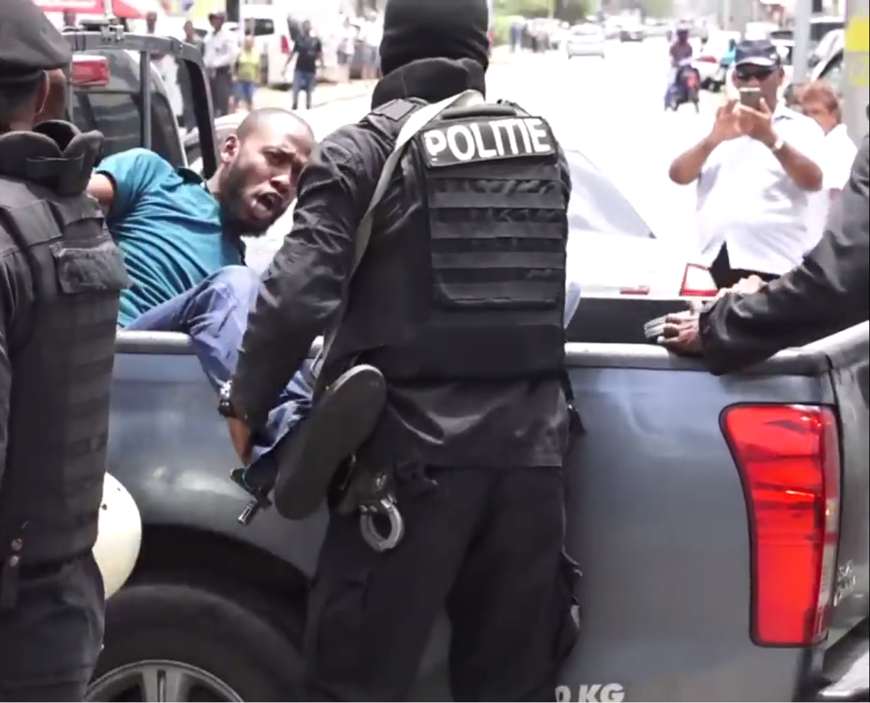 Mobiele Eenheid arresteert Curtis Hofwijks